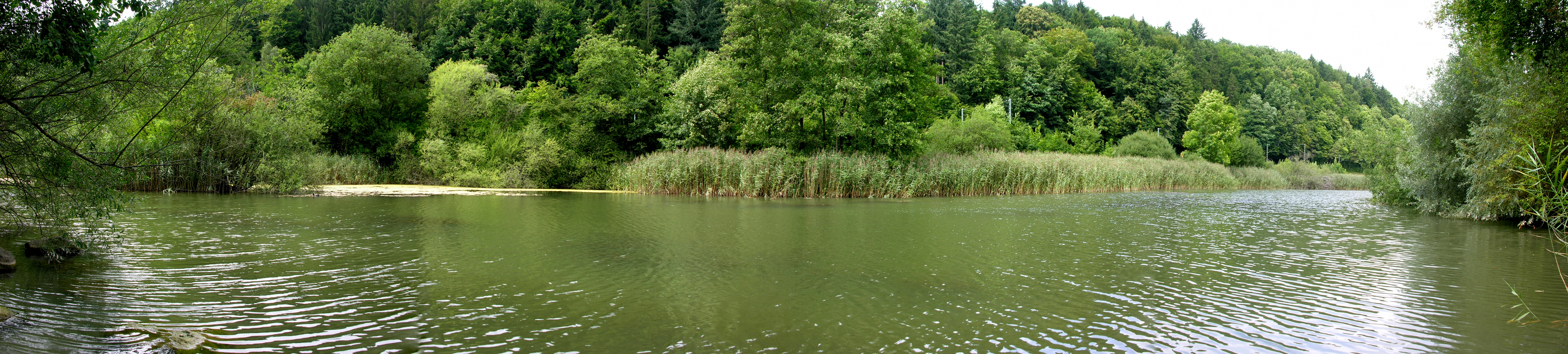 Switzerland, Schaffhausen, Schaffhausen-Herblingen